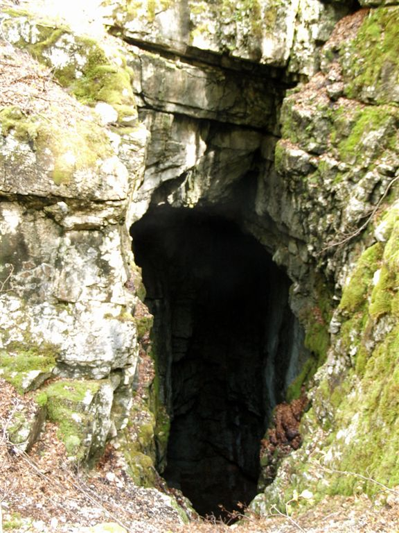 Kalarjev ledenik